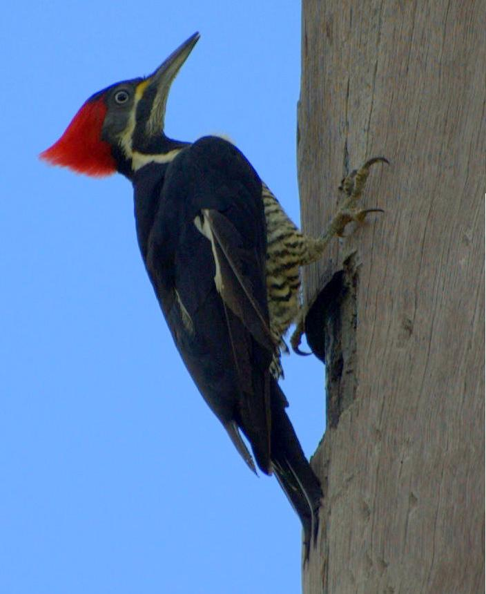 Estrada velha Piraju / Sarutaiá